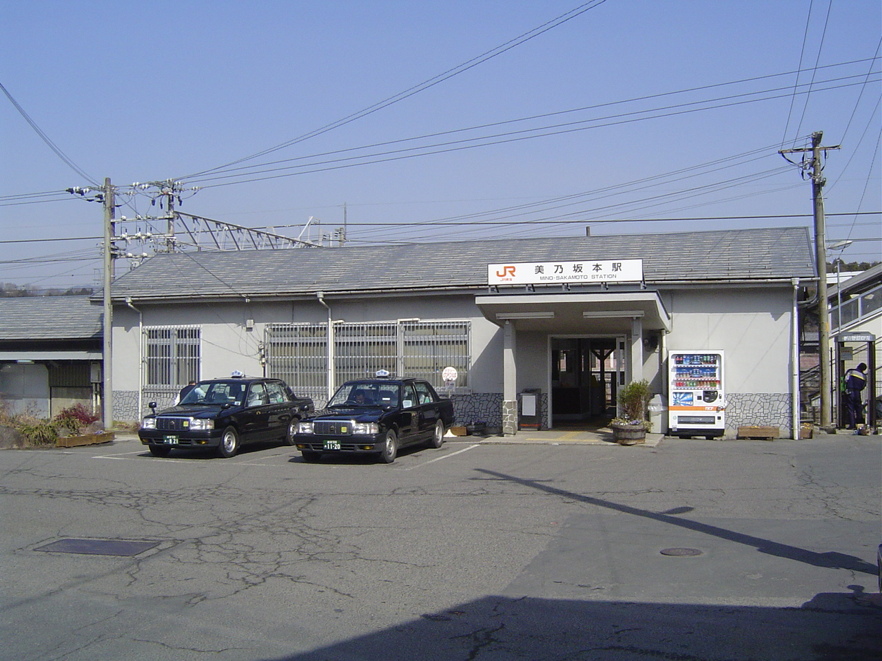 中央本線・美乃坂本駅（JR東海）Sony Cyber-shot DSC-P8